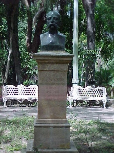 Busto de Gustav Knoop en el Parque Gustavo Knoop o parque Los coquitos en Los Teques, estado Miranda Venezuela